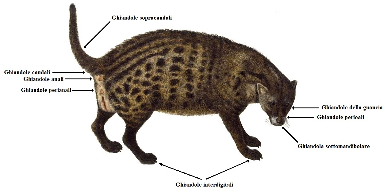 Posizionamento delle ghiandole odorifere su un carnivoro generico (civetta africana), illustrazione di Vincenzo Leonardi (1630)